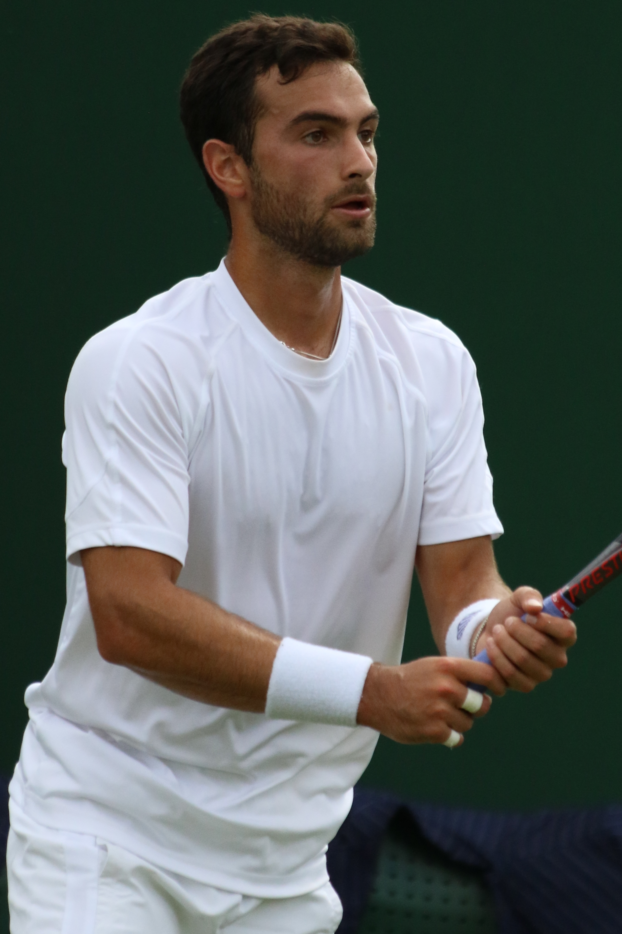 Rubin WM19 (17)